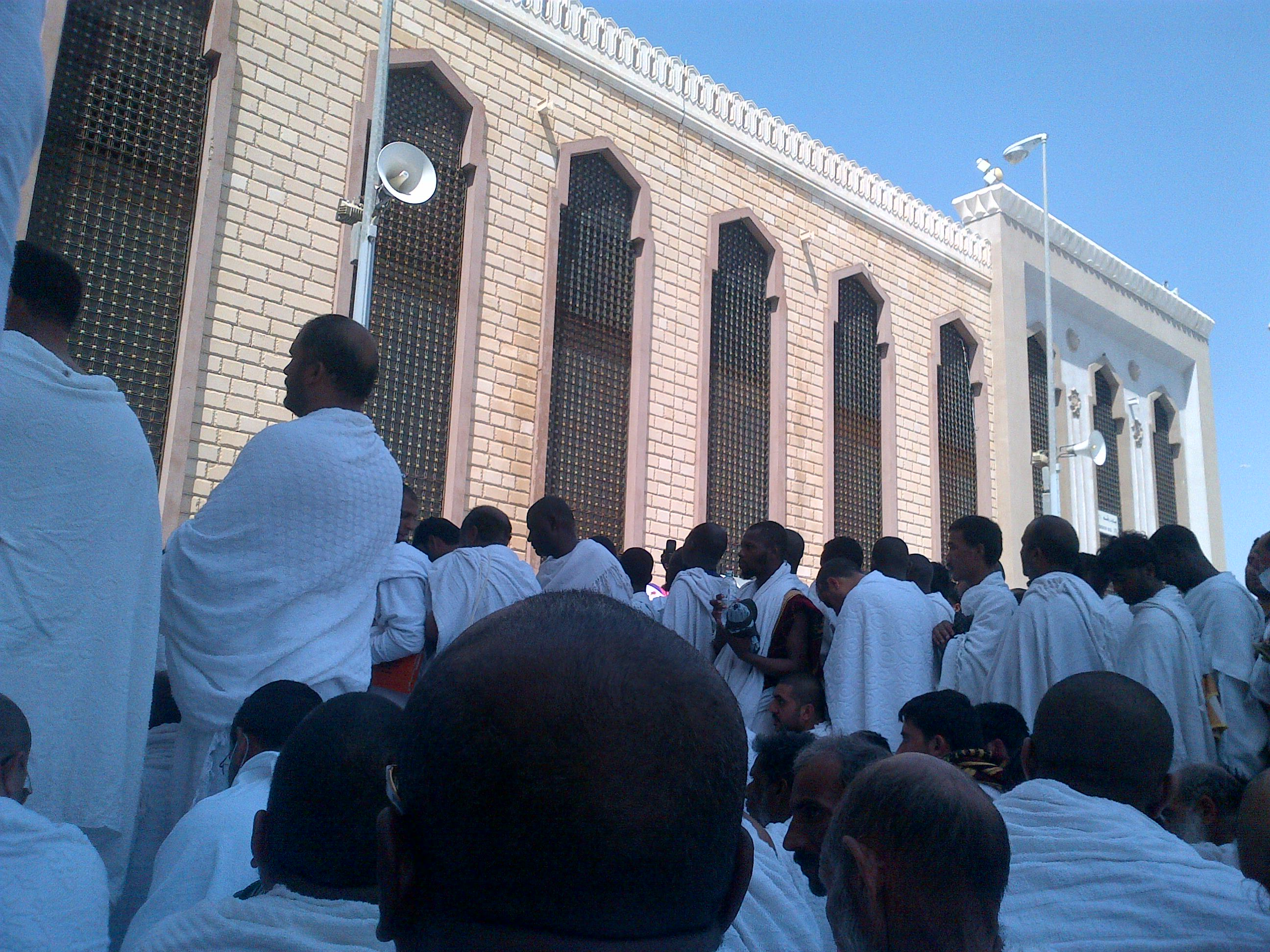 Jamaah Haji berdiri di luar Masjid Namirah, Arafah, Arab Saudi, saat Khutbah Arafah di Hari Arafah